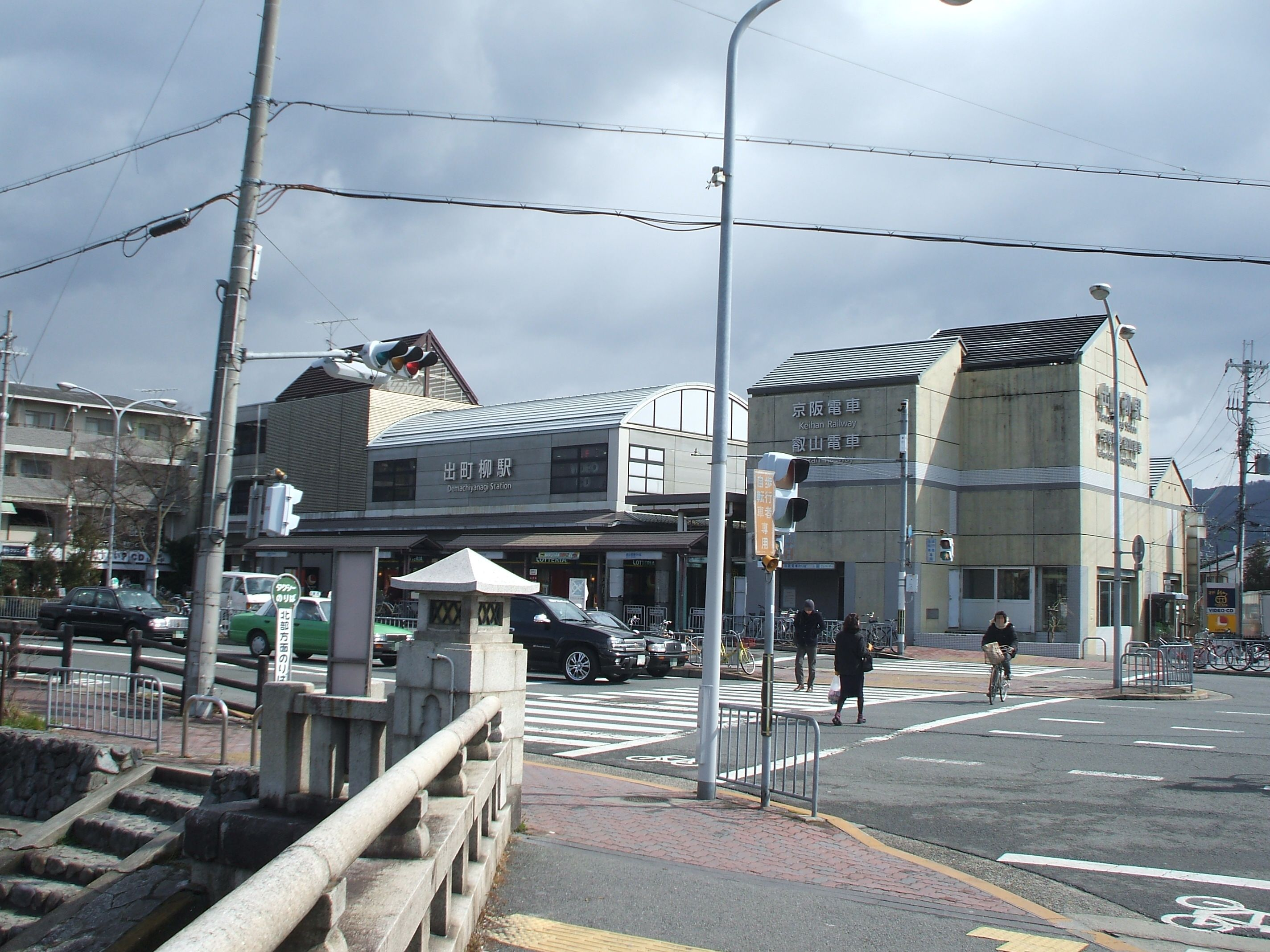 京阪電鉄・叡山電鉄 出町柳駅